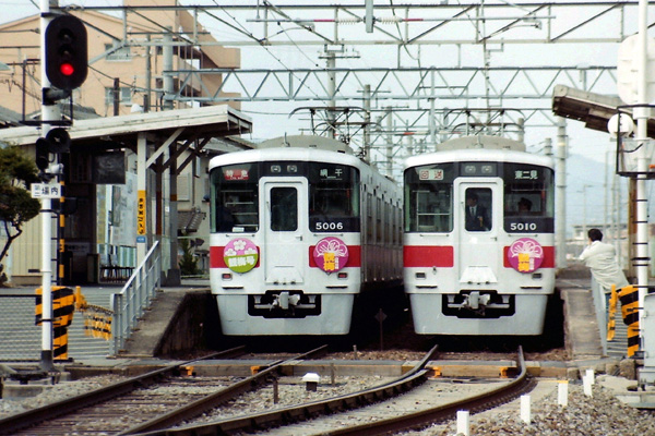 「観梅号」は例年２～３月の土日に往復２本ずつ運行。左の電車は２本目の網干行き「観梅号」、右の電車は網干までの運転を終えて、東二見へと回送される１本目の「観梅号」。いずれも、午前中に運転された往路および往路回送の様子。日にちは不明。